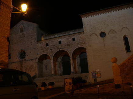 Concattedrale di Osimo, dedicata a San Leopardo.